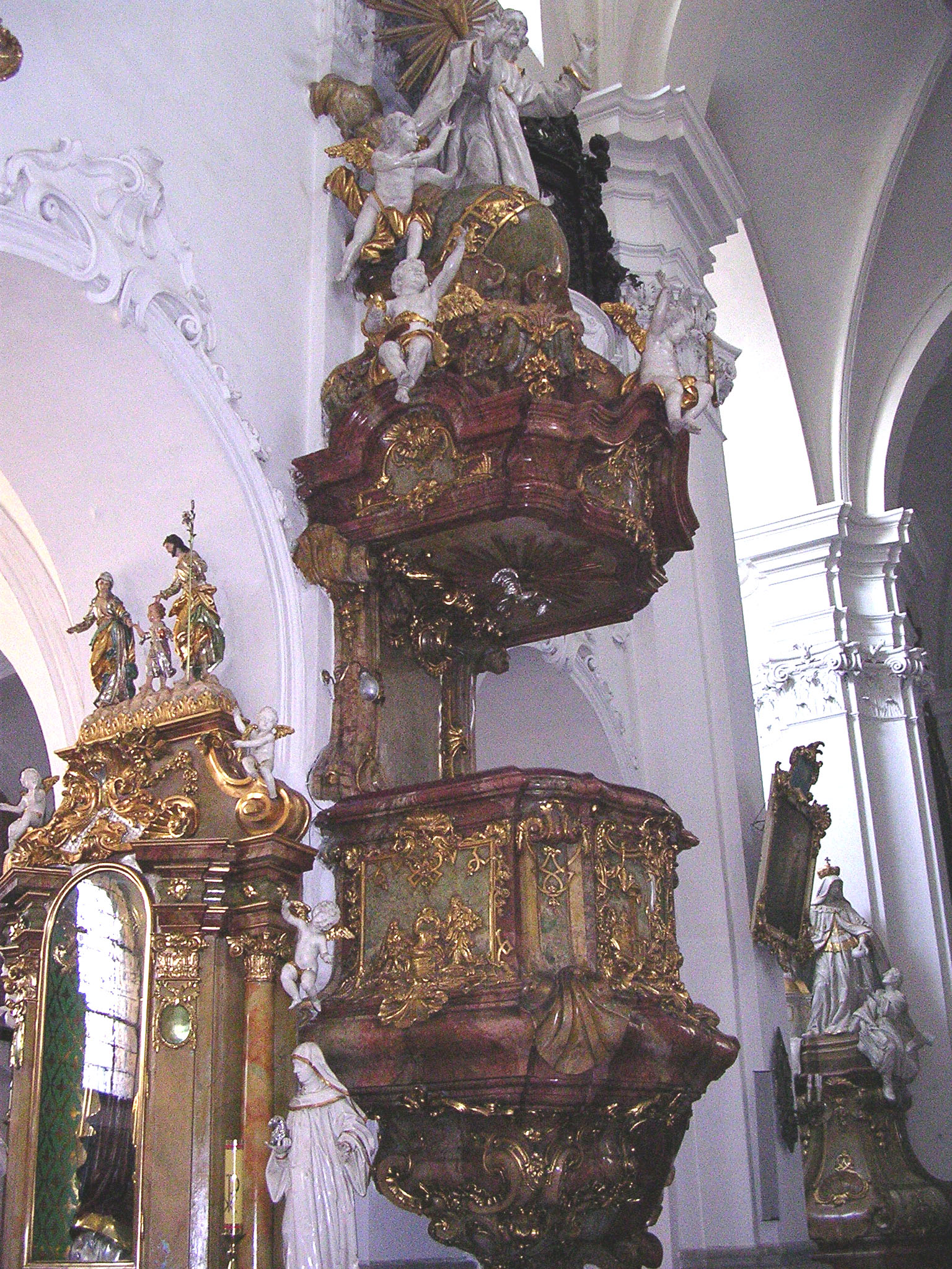 Trzebnica, kościół, ob. par. p.w. śś. Bartłomieja i Jadwigi, 2 poł. XIII